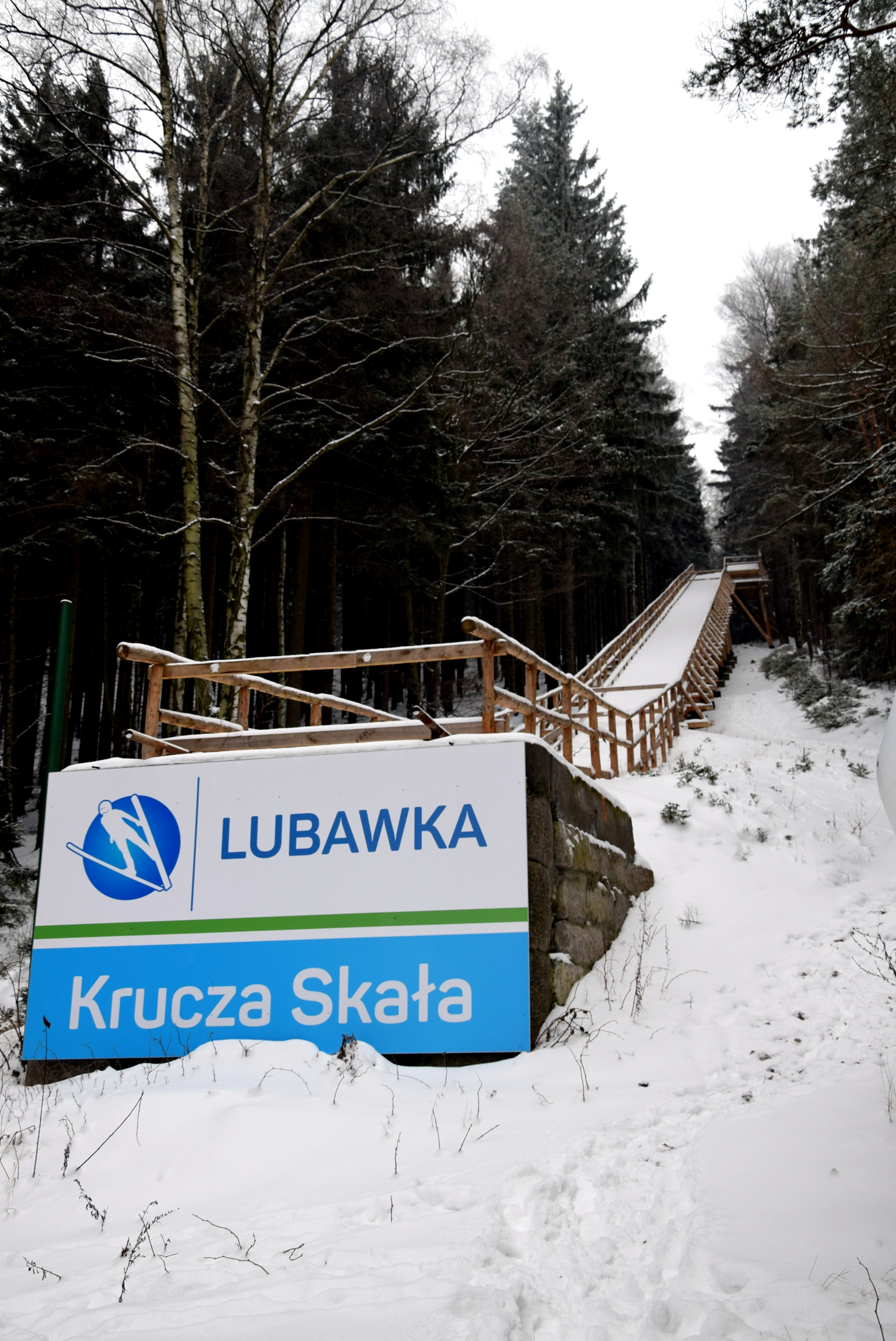 Zdjęcie przedstawia próg skoczni narciarskiej w Lubawce